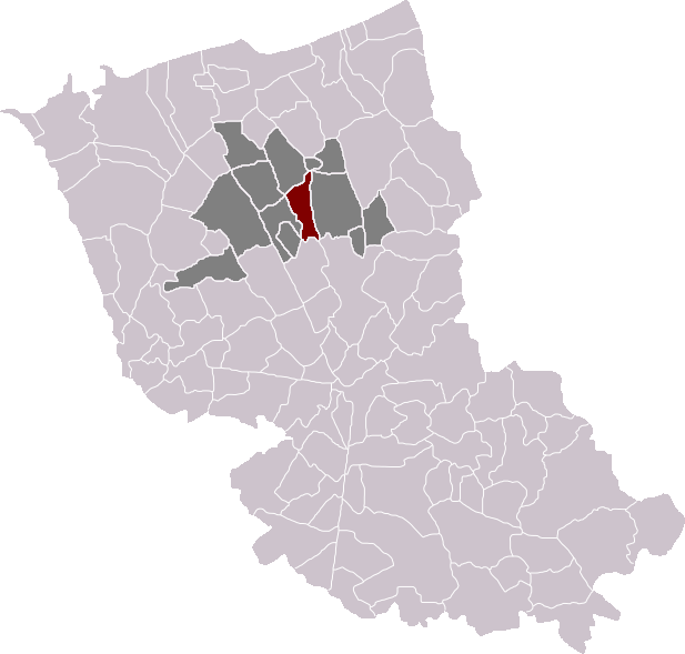 Locatie gemeente Soks in arrondissement Duinkerke. Zelfgemaakt. Location of Socx municipality in the arrondissement of Dunkirk. Self made. Localisation de la commune de Socx dans l'arrondissement de Dunkerque. Fait moi-même.